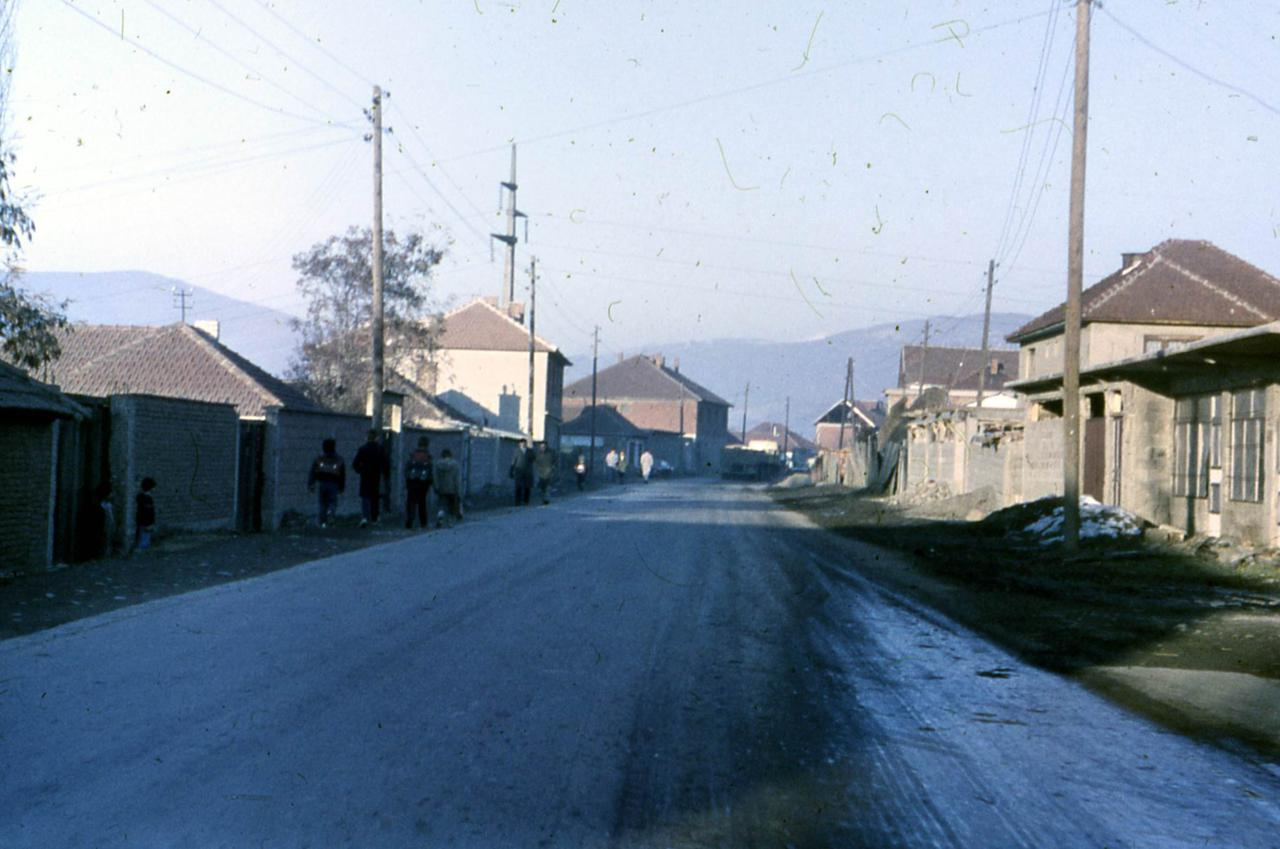 Высокие Дечани (Косово)